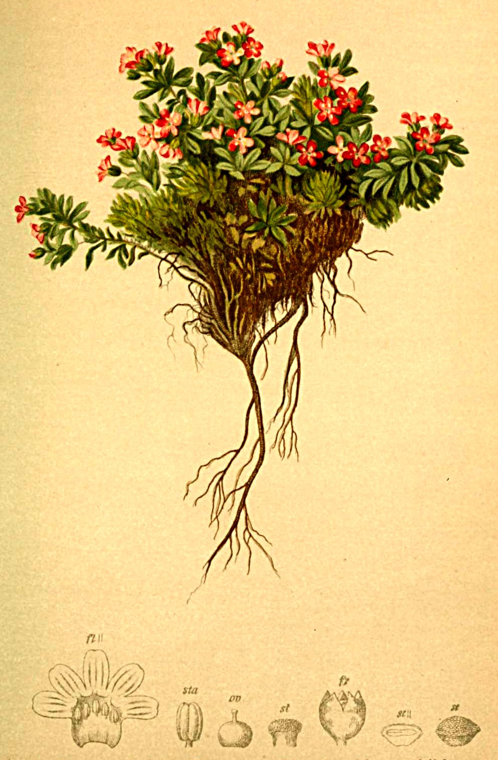 Androsace glacialis (Androsace alpina)